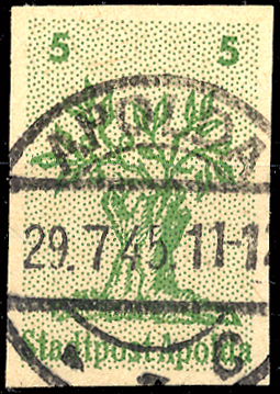 Провизорная марка города Апольда (Тюрингия)